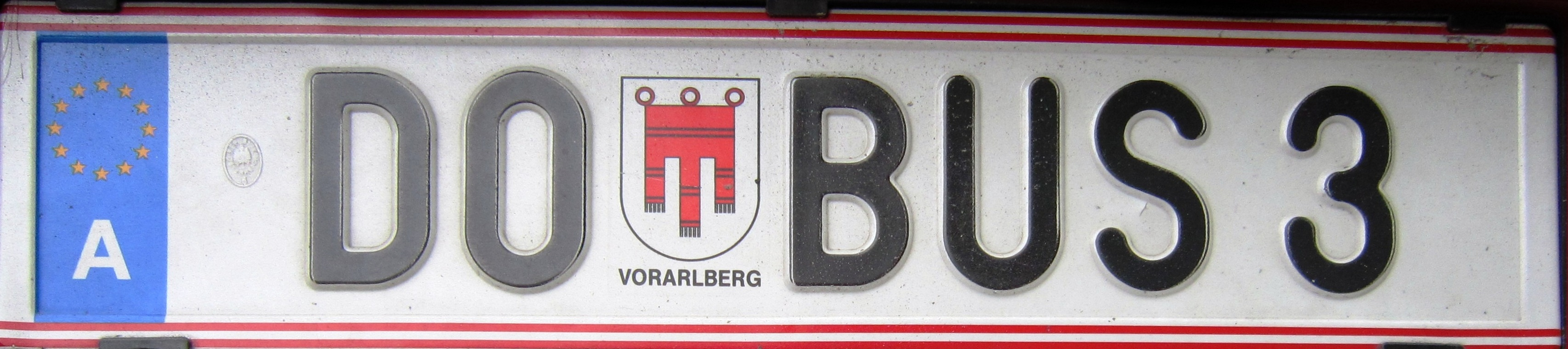 Oostenrijk kenteken